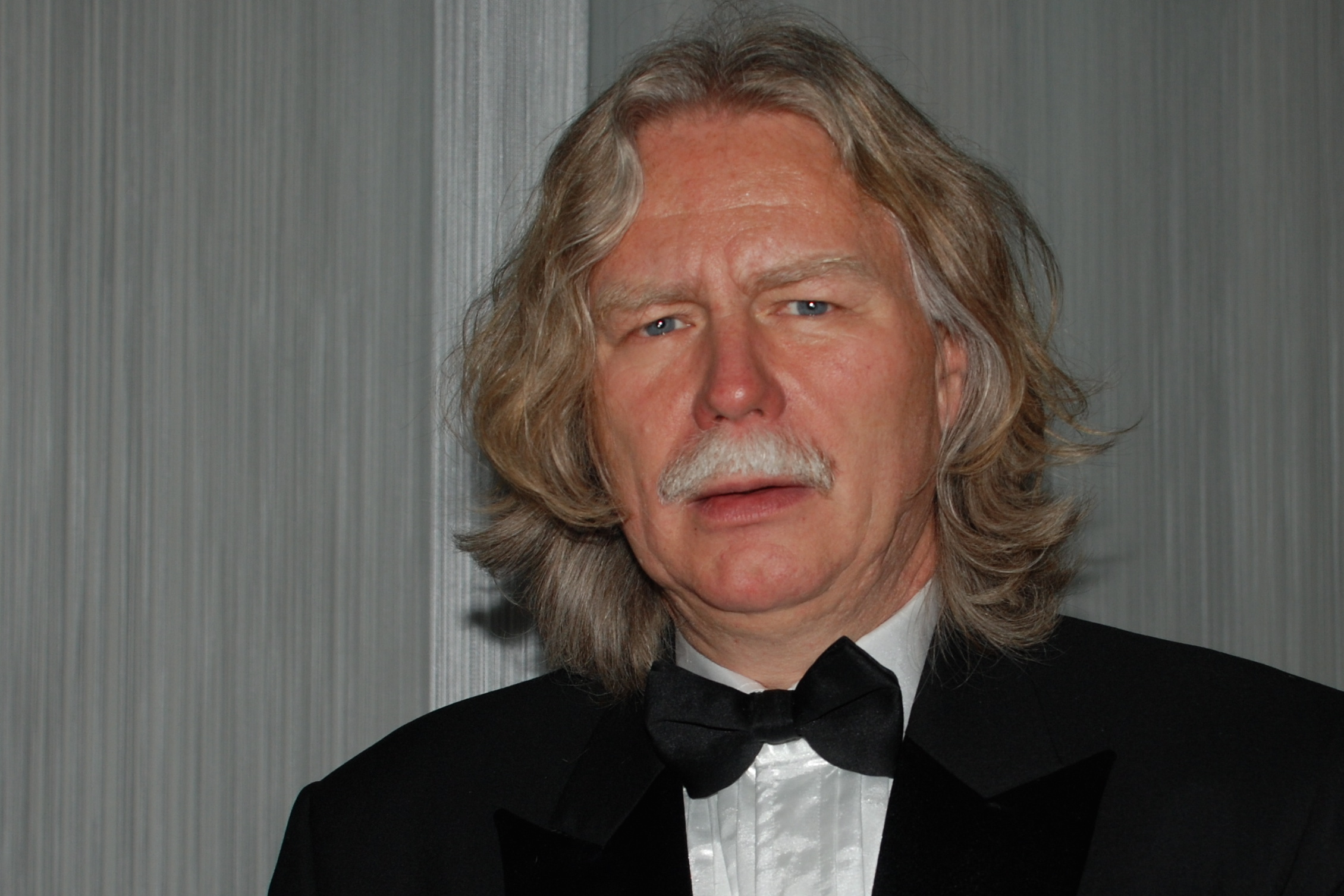 Friðrik Þór á Edduverðlaununum árið 2007